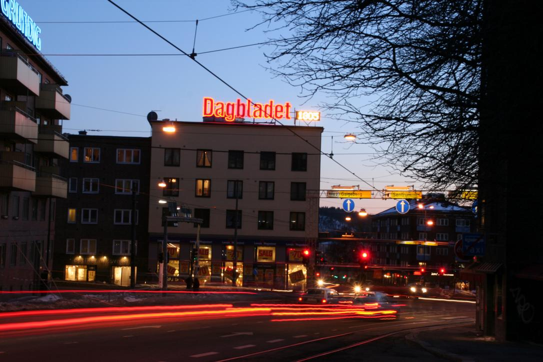 Carl Berners plass i Oslo.